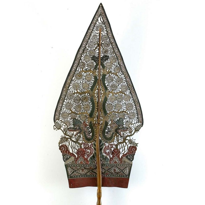 Wajangfiguur. Wajangfiguur van karbouwenhuid, pauzeteken Unknown language: wayang purwa gunungan